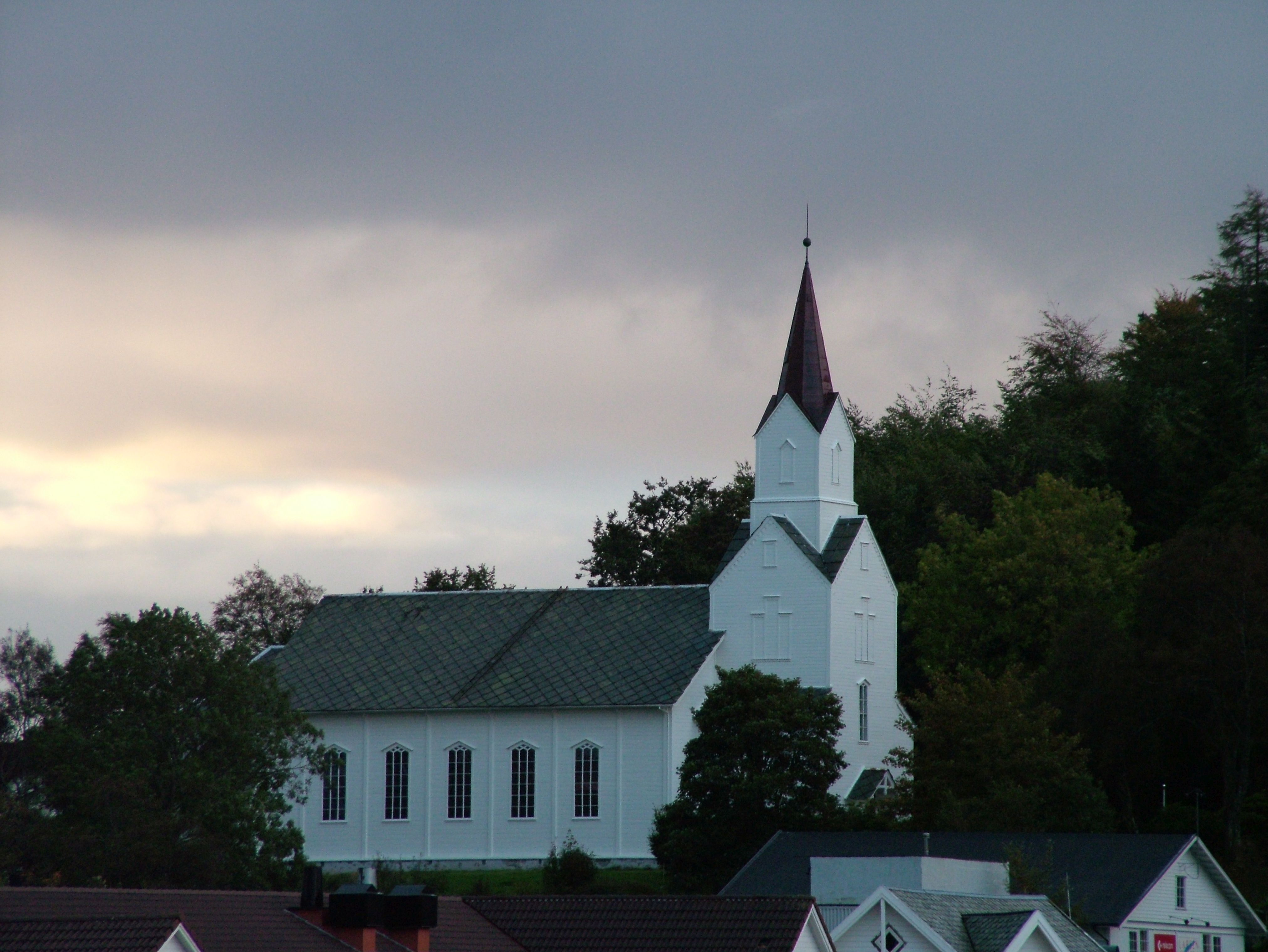 Florø kyrkje